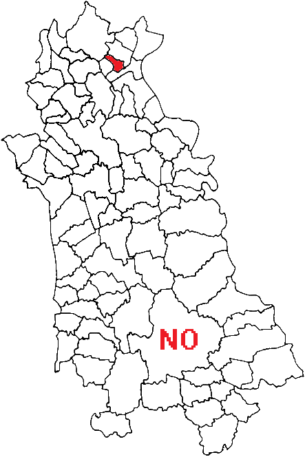 Mappa con posizione del comune nella provincia italiana di Novara